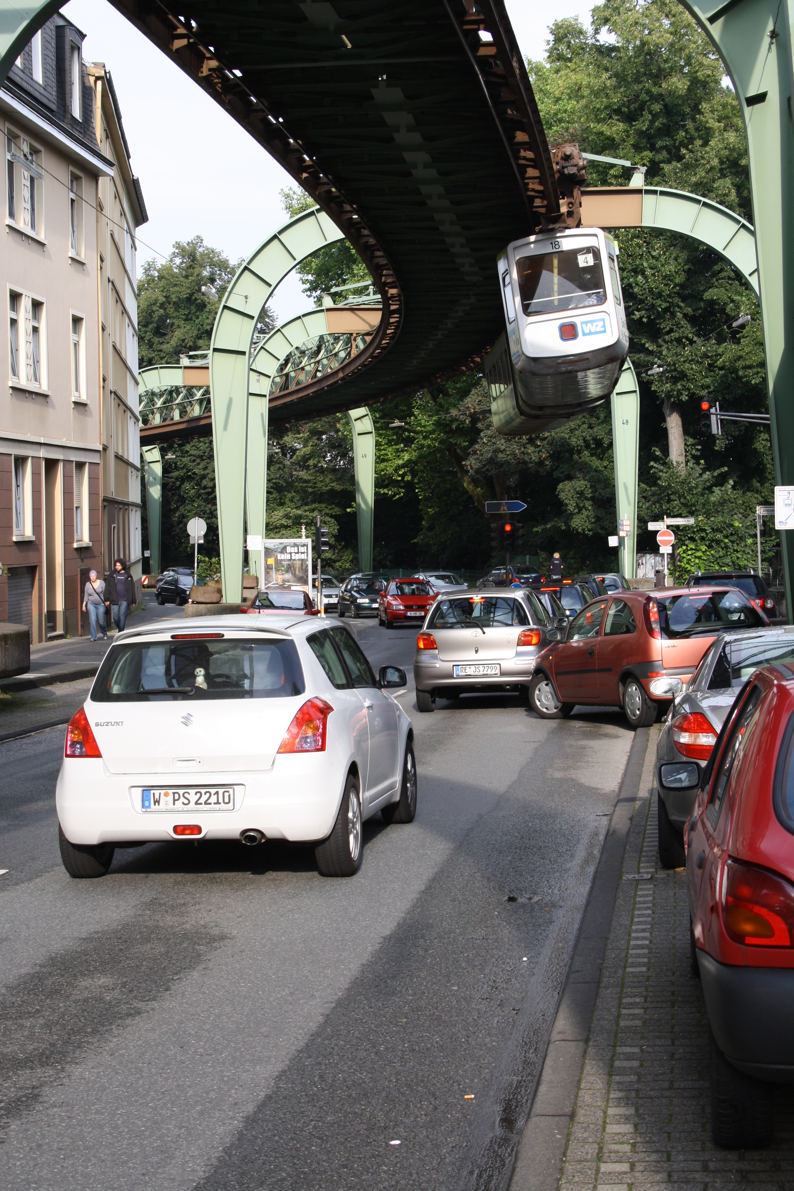 Schwebebahn Wuppertal